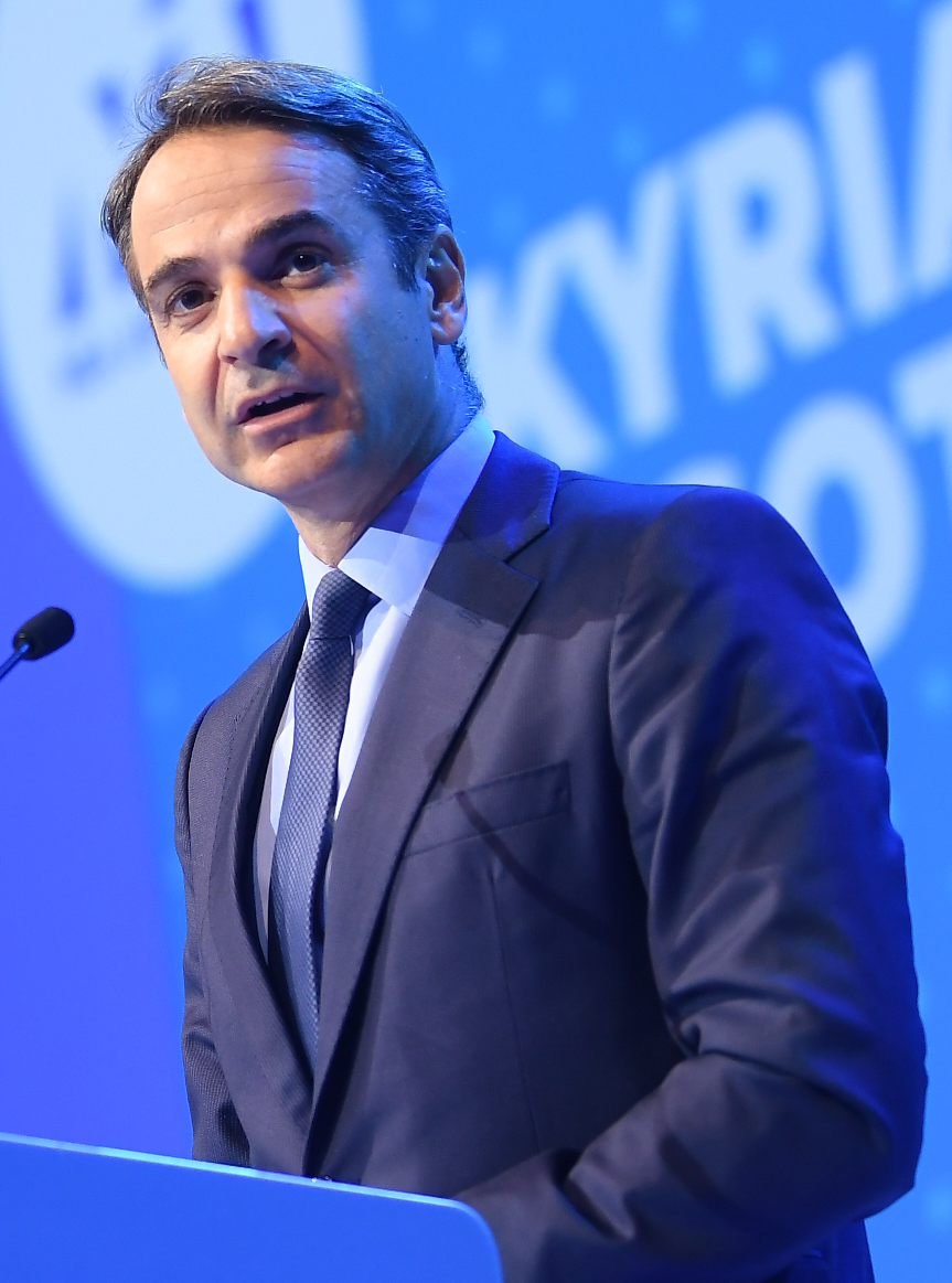 AAA_2108